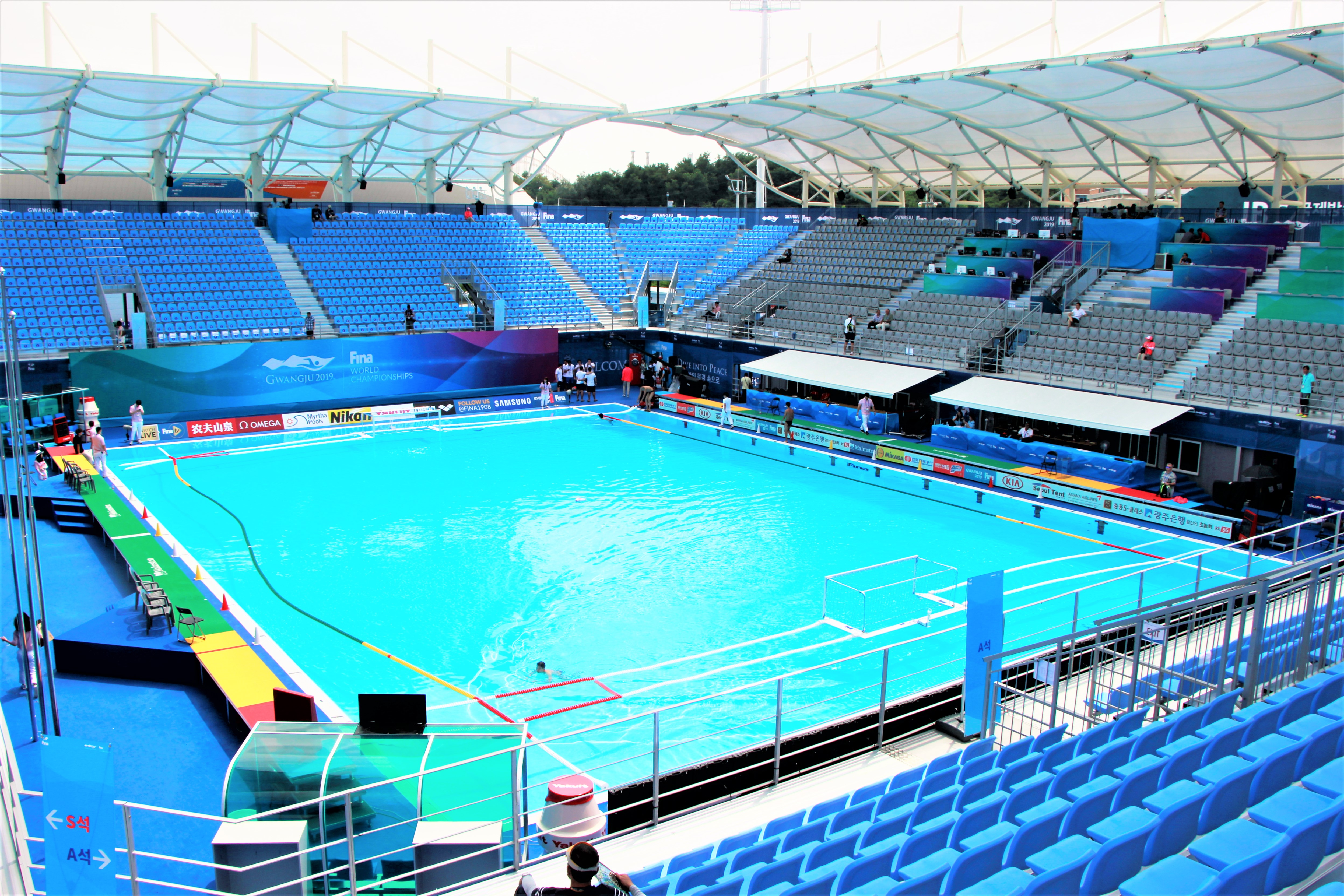 2019 광주FINA세계수영선수권대회 당시 수구 경기장으로 활용되었던 남부대학교 축구장 가설 스탠드.